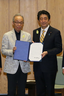 谷村新司と安倍晋三（再犯防止推進のための国・地方・民間会合にて）